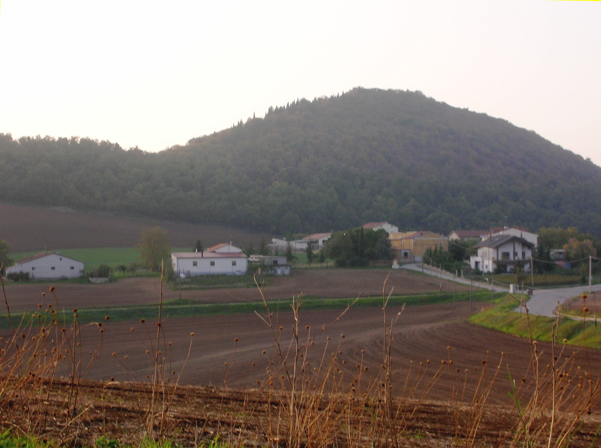 Veduta di Monticchio Sgarroni, frazione di Rionero in Vulture